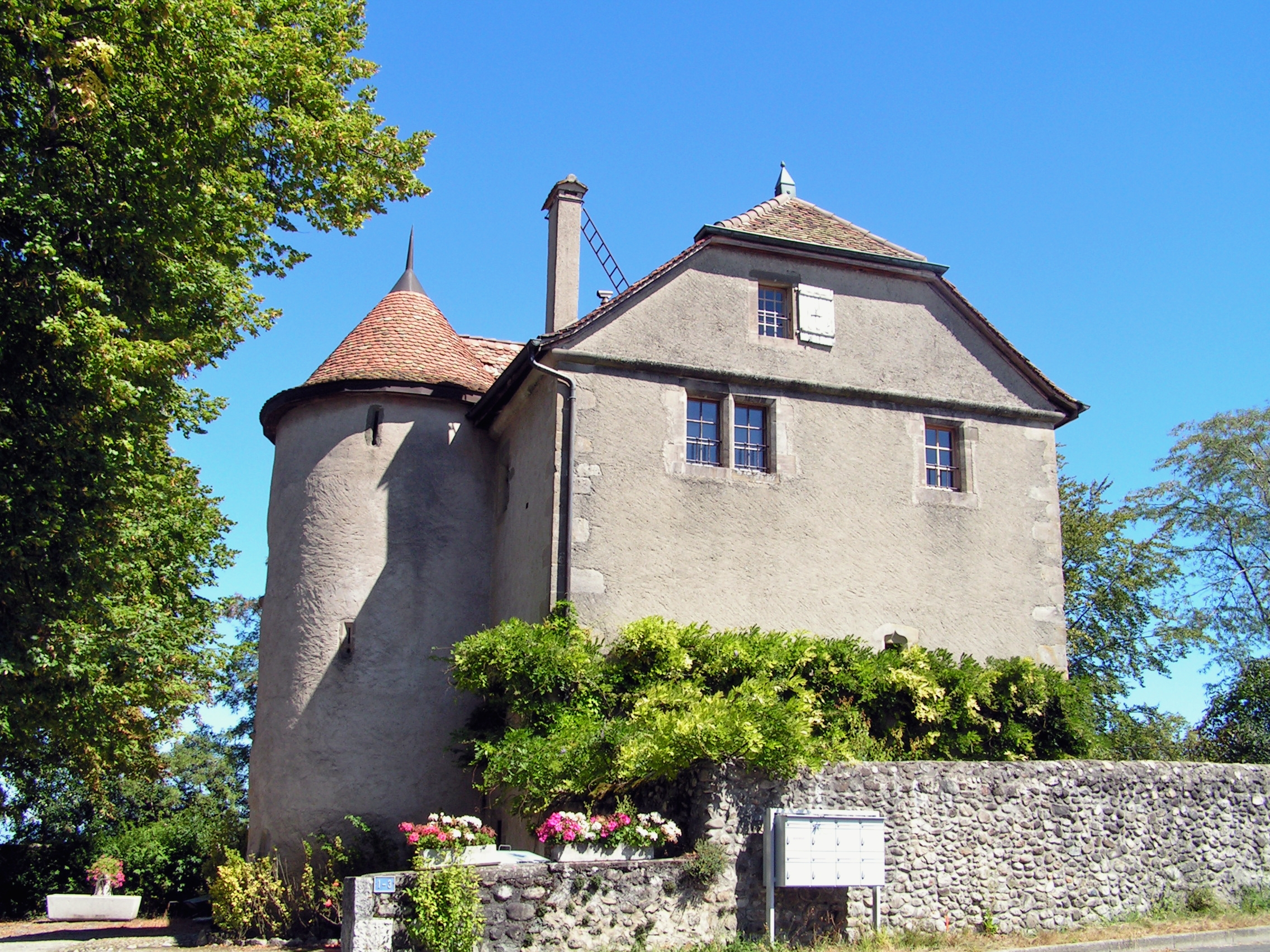 Chemin de Plein-Vent 3, Plan-les-Ouates. Maison forte d'Arare.